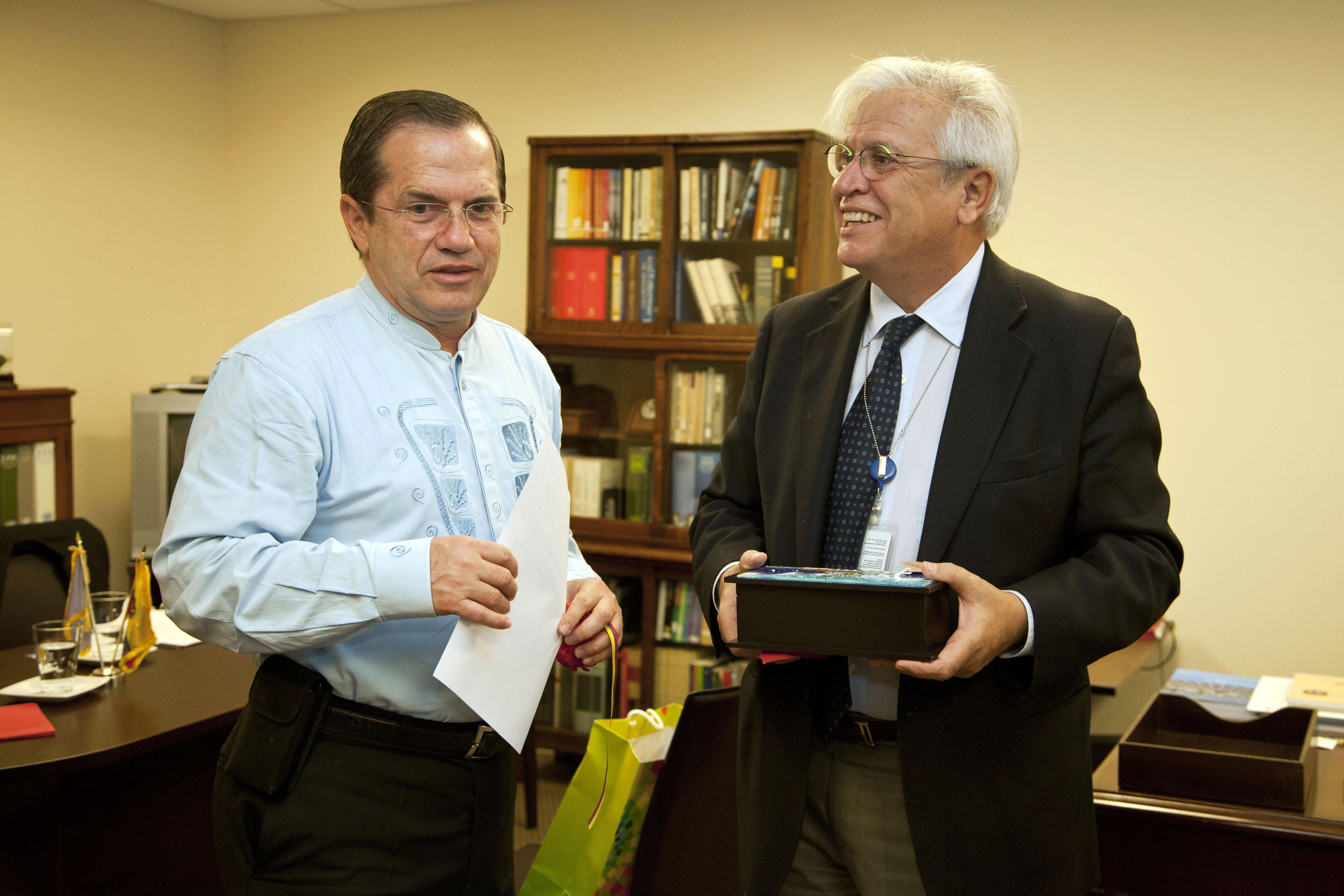 Nueva York (Estados Unidos), 23 de septiembre 2013. El Canciller del Ecuador, Ricardo Patiño, inició su agenda del 68 Período de Sesiones de la Asamblea General de la ONU con: Reunión de Alto Nivel sobre Personas con Discapacidad y Desarrollo y con la Reunión bilateral con el director de ONU-Hábitat, Joan Clos. Foto: Fernanda LeMarie - Cancillería del Ecuador.